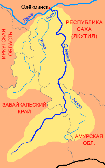 Схема бассейна реки Олёкма